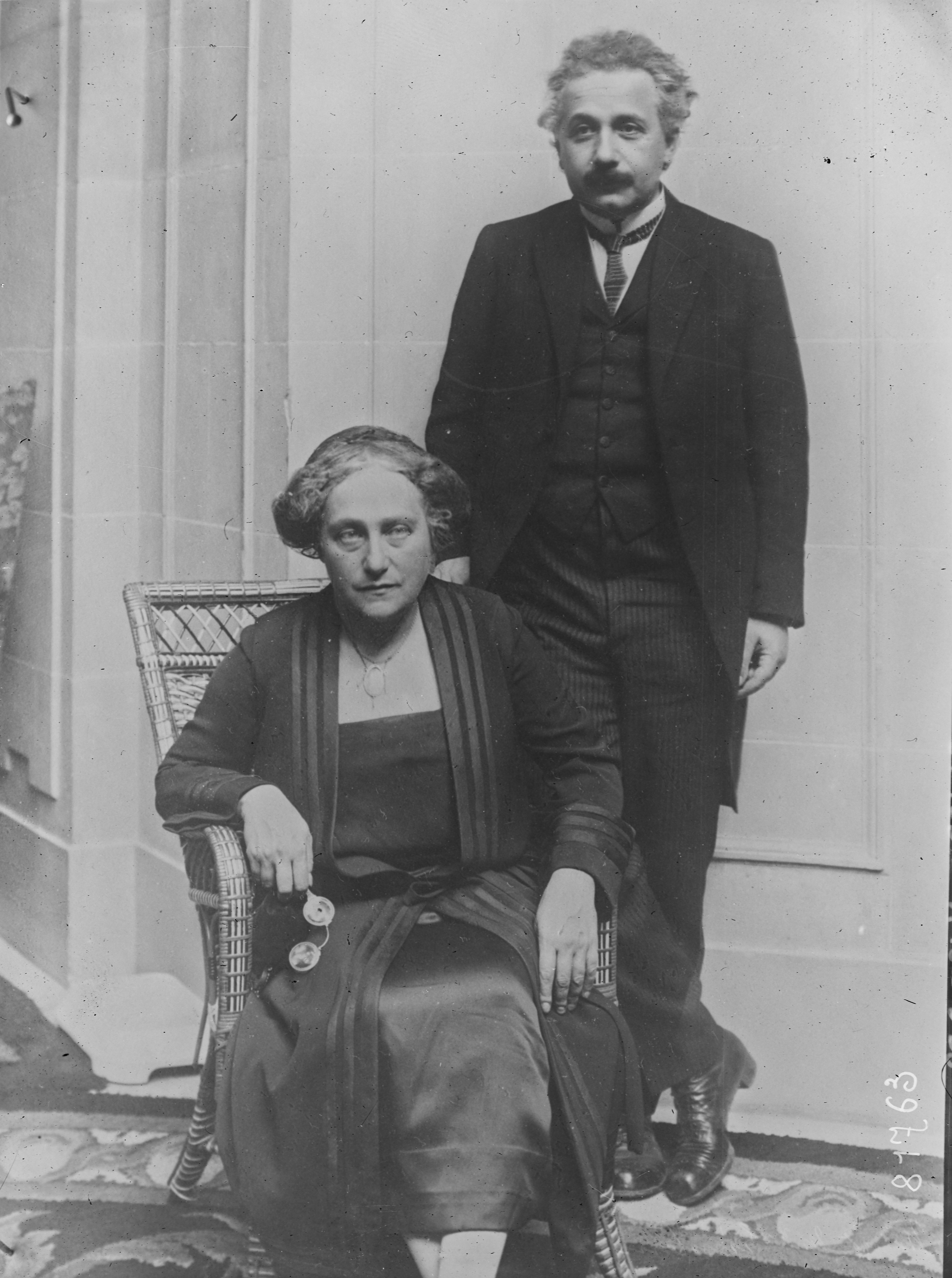 Titre : M. et Mme Einstein : [photographie de presse] / [Agence Rol]